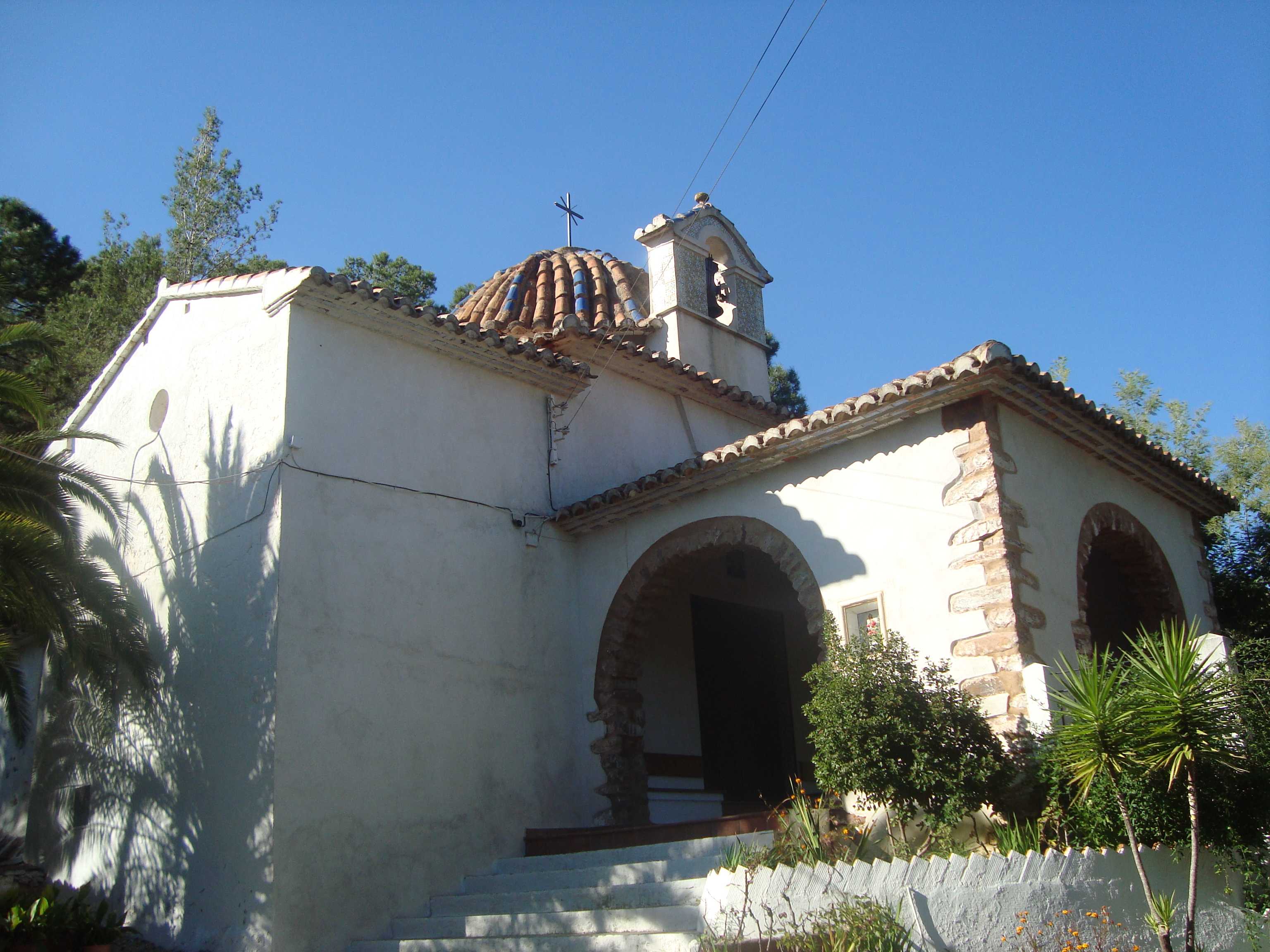 Ermita del Crist del Calvari (Eslida) 06.057-003.